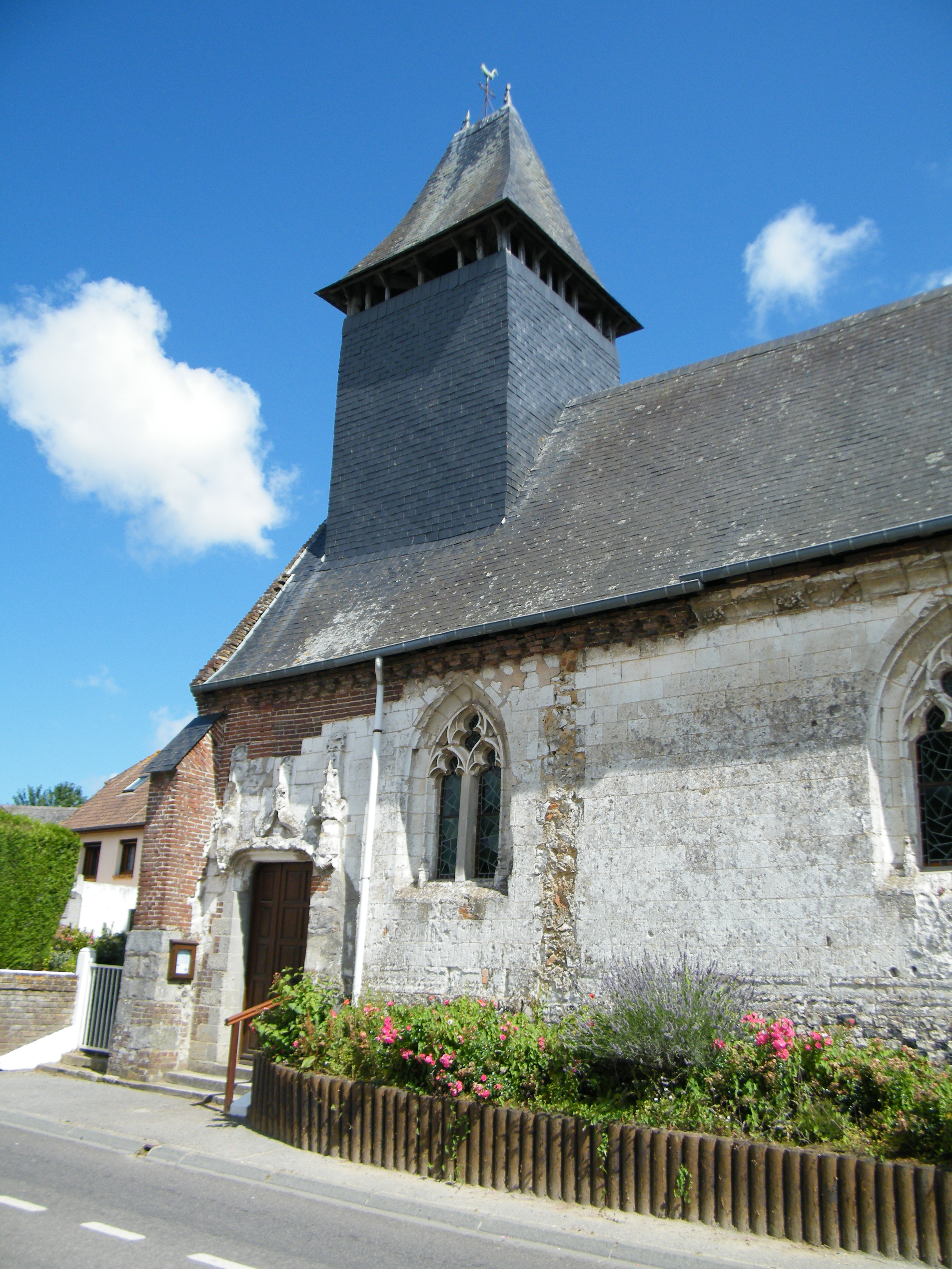 Gouchaupre, Seine-Maritime, France, église